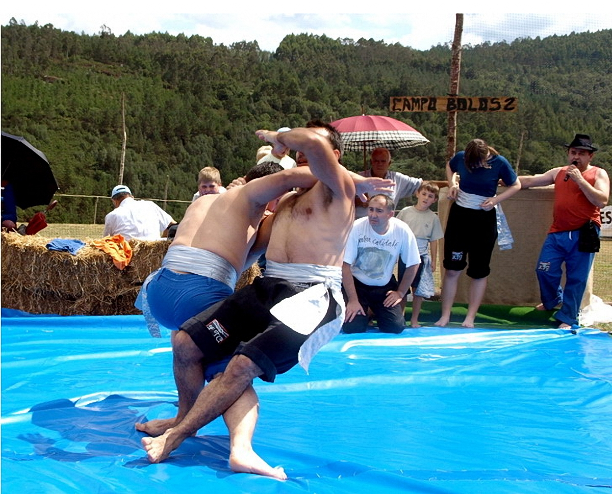 Demostración de Loita Tradicional Galega durante o encontro de xogos e deportes tradicionais en Santalla, A Pontenova (A Pontenova) en 2008